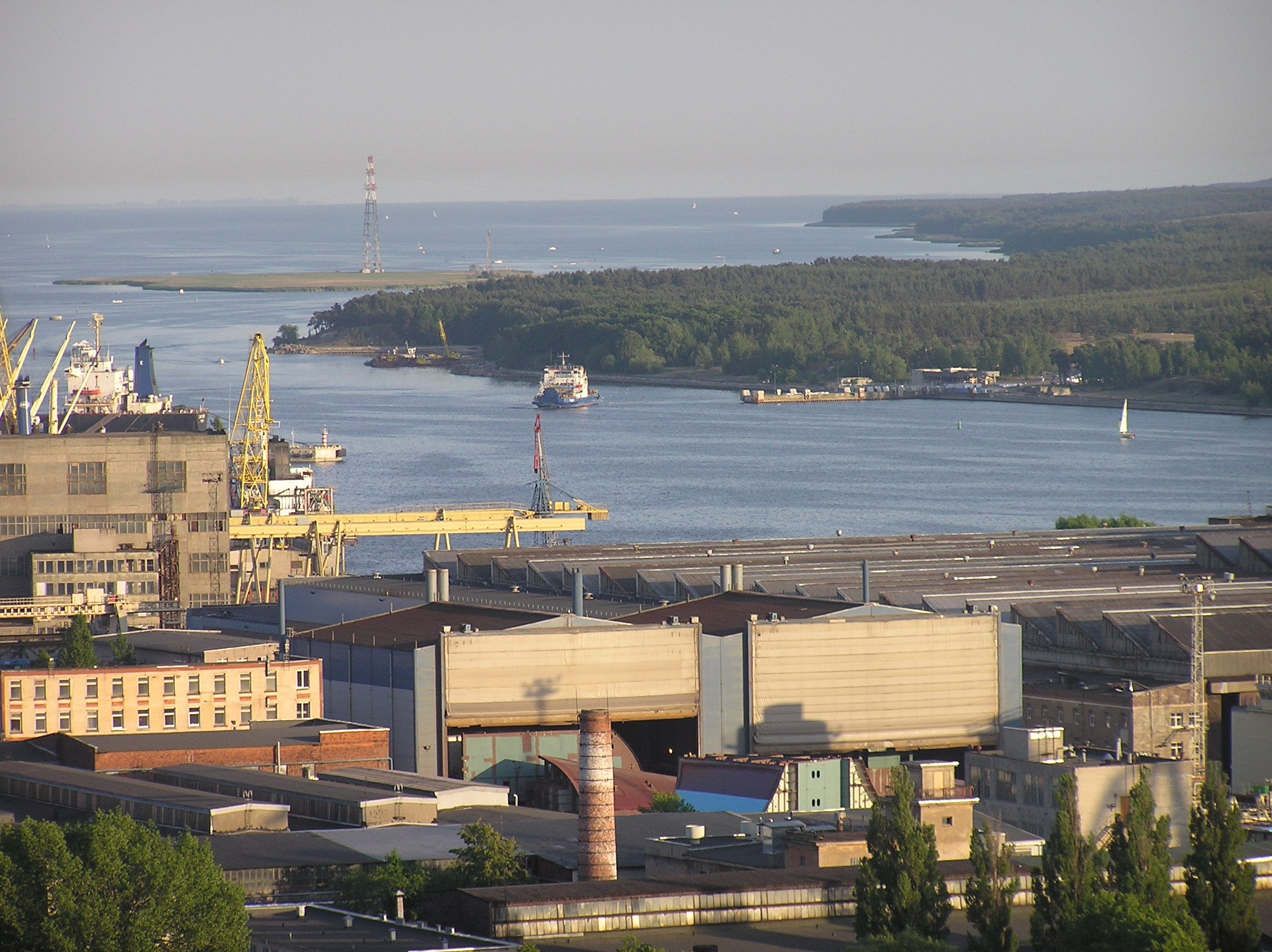 Blick über Klaipeda